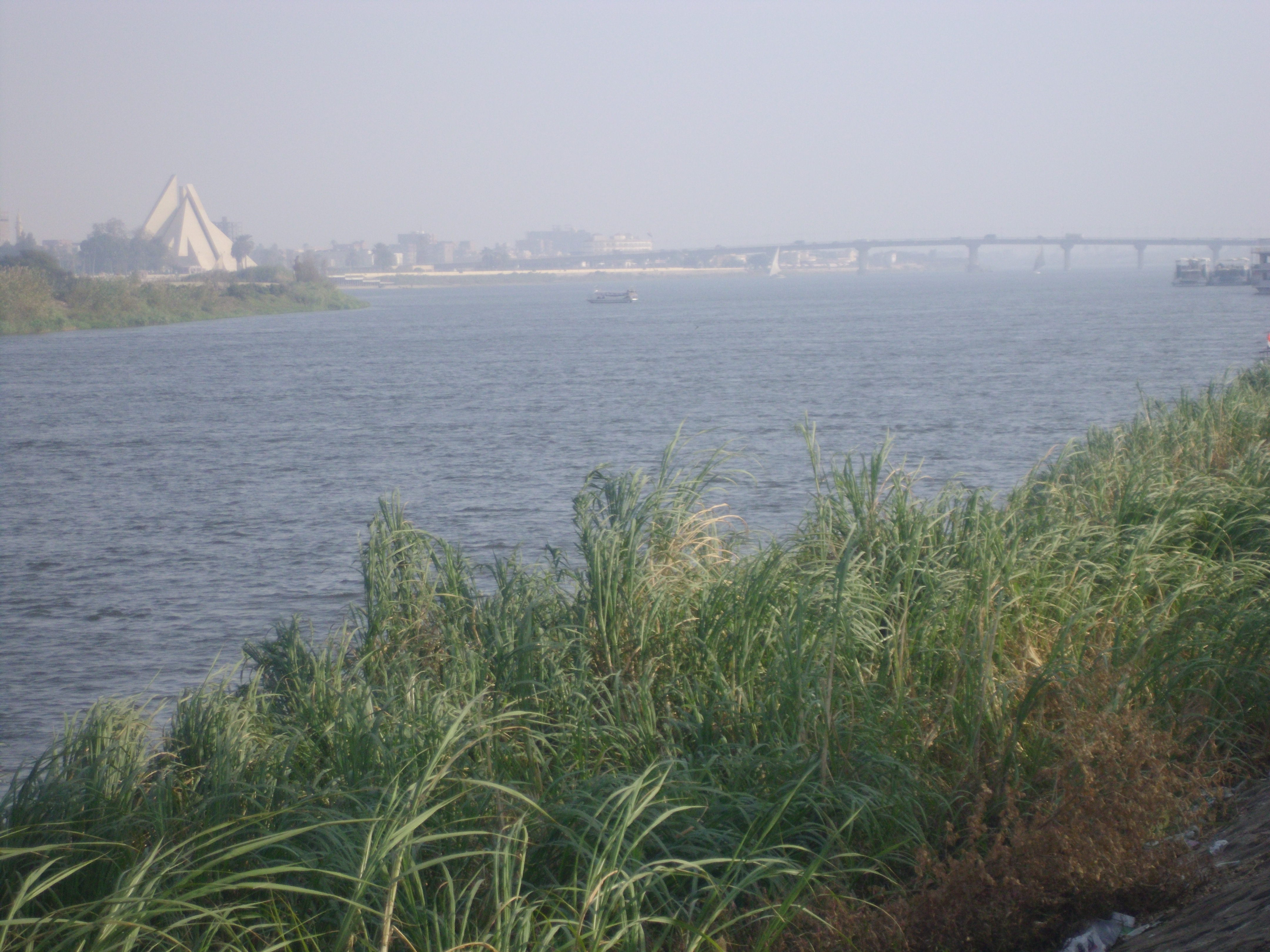 نهر النيل بمينة المنيا شتاءا